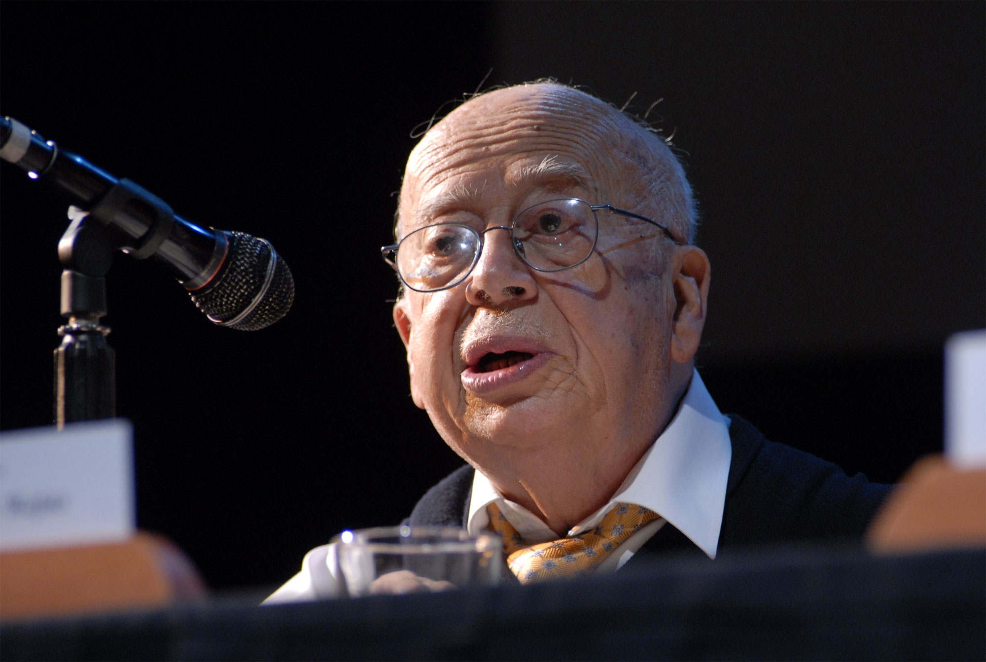 Gonzalo Rojas Pizarro (Lebu, 20 de diciembre de 1917 – Santiago, 25 de abril de 2011) fue un profesor y poeta chileno perteneciente a la llamada «Generación de 1938». Su obra se enmarca en la tradición continuadora de las vanguardias literarias latinoamericanas del siglo XX. Ampliamente reconocido a nivel Hispanoamericano, fue galardonado, entre otros, con el Premio Reina Sofía de Poesía Iberoamericana 1992, el Premio Nacional de Literatura de Chile 1992 y el Premio Cervantes 2003. El encuentro 'Chile mira a sus poetas' reúne a expertos y destacadas figuras de las letras chilenas.